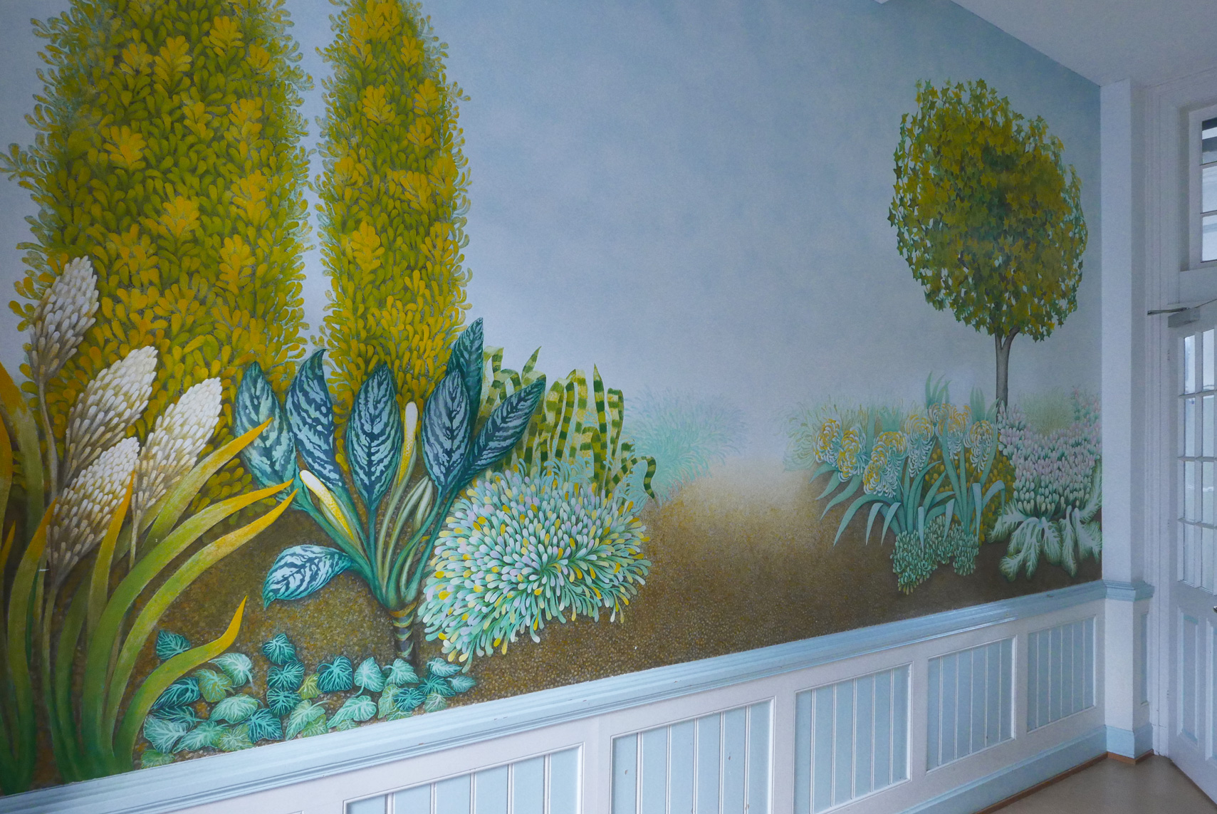 Karin Schaub, 1985, 1. Preis im Basler Kunstkredit-Wettbewerb, Wandbilder im Eingangsbereich des Instituts für Pflanzenphysiologie der Universität Basel.